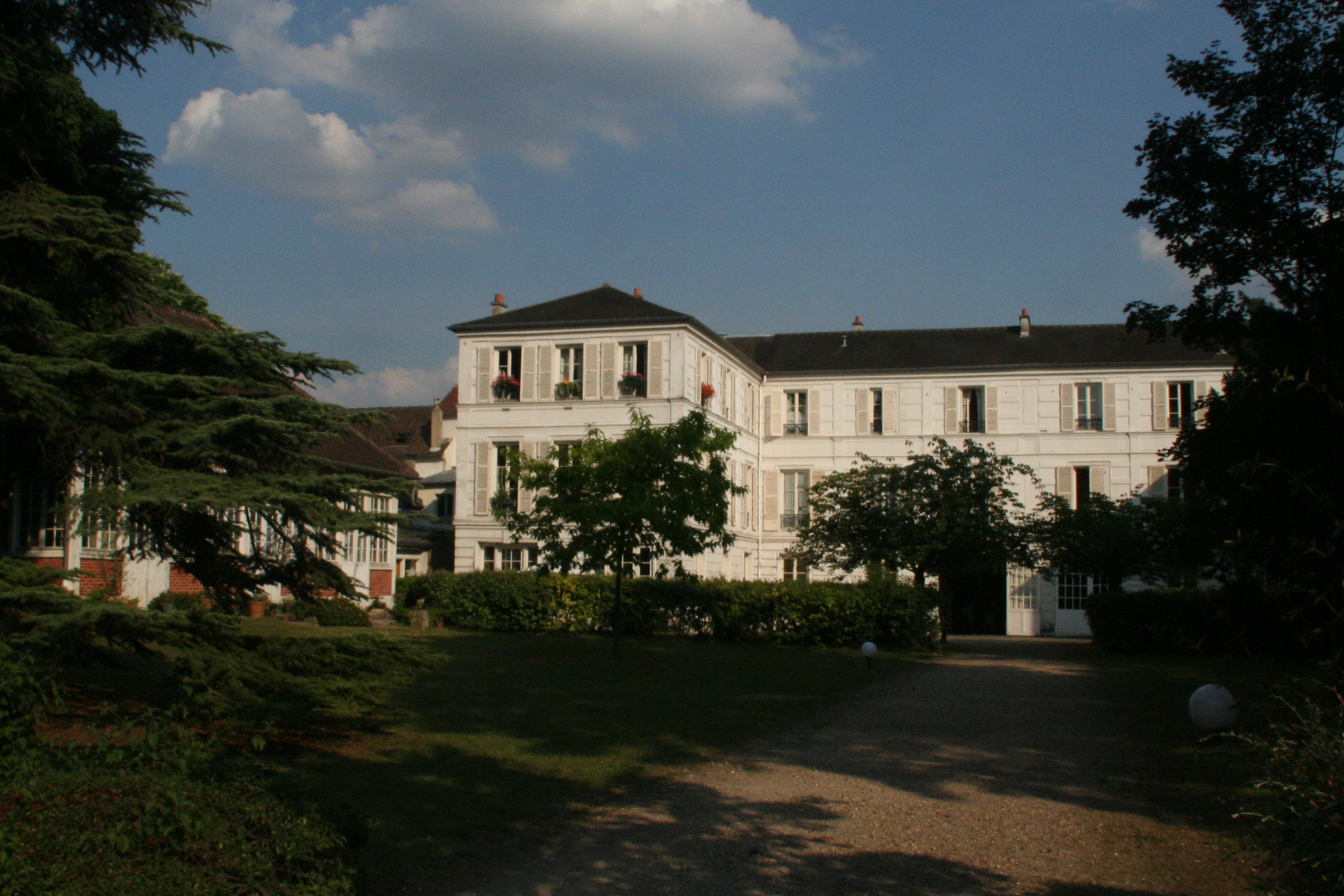 Façad coté jardin de la maison Joséphine à Croissy où vécu Joséphine de Beauharnais